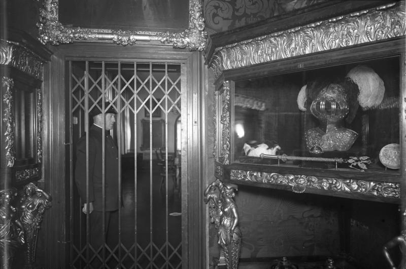 Die preussischen Kroninsignien im Hohenzollernmuseum in Berlin ! (Erstmalig gestattete Aufnahmen) Im Hohenzollernmuseum in Berlin werden dem Publikum in einem Tresorraum die preussischen Kroninsignien, Zepter, Reichsapfel, Totenhelm, Kurhut und Reichssiegel gezeigt. Die wertvollen Stücke stehen unter ständiger Bewachung. Blick in den Ausstellungsraum mit der vergitterten Eingangstür. Rechts im Schrank die Kroninsignien.